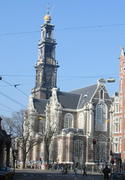 Amsterdam Westerkerk, foto gemaakt en aangeboden voor vrij gebruik door gebruiker:Ellywa